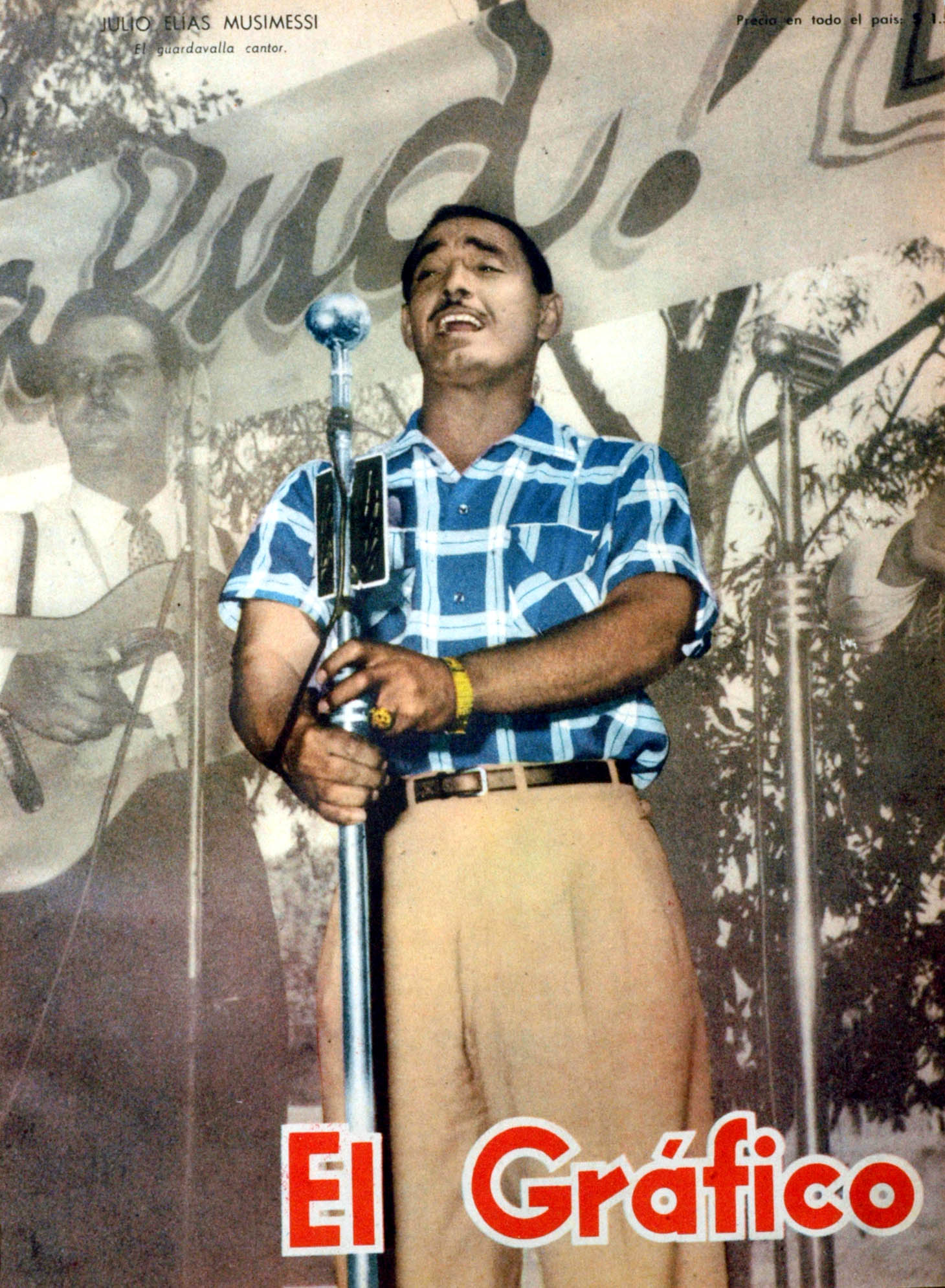 El Grafico del 02 de Marzo de 1956. Edicion 1906